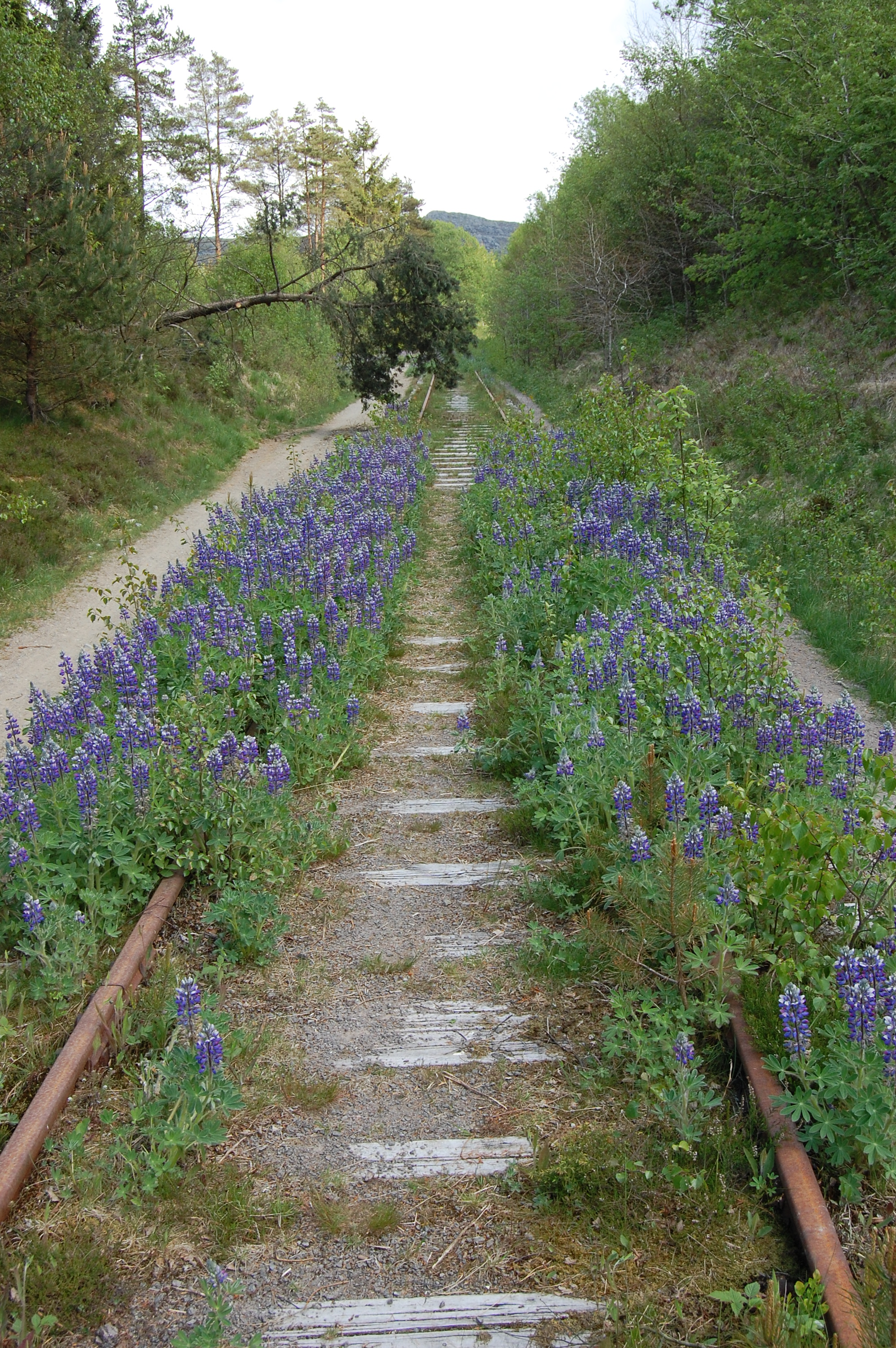 Jarnebanespor etter den nedlagde Ålgårdbanen